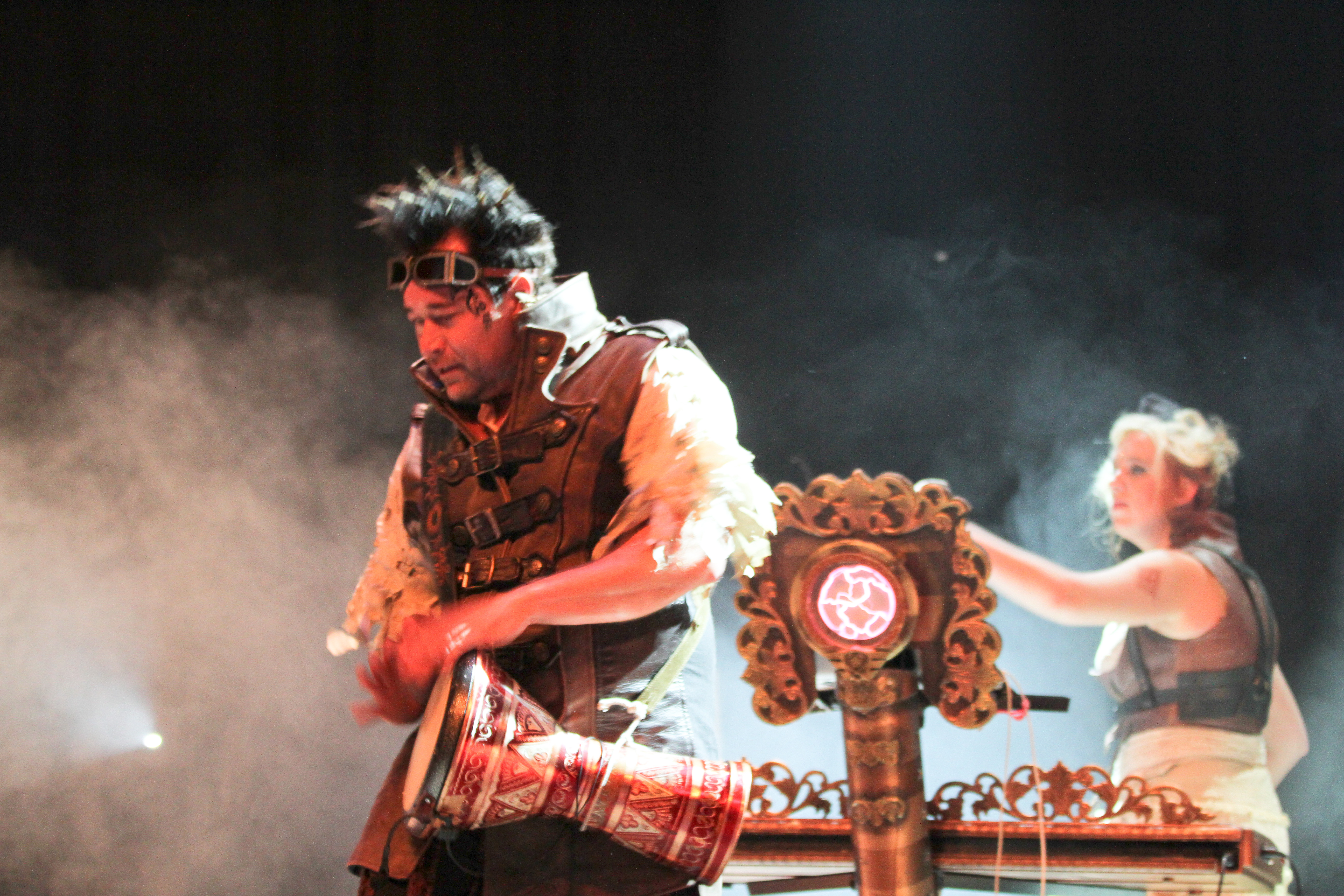 Abney Park auf dem Wave-Gotik-Treffen 2013 in Leipzig, Agra-Halle.